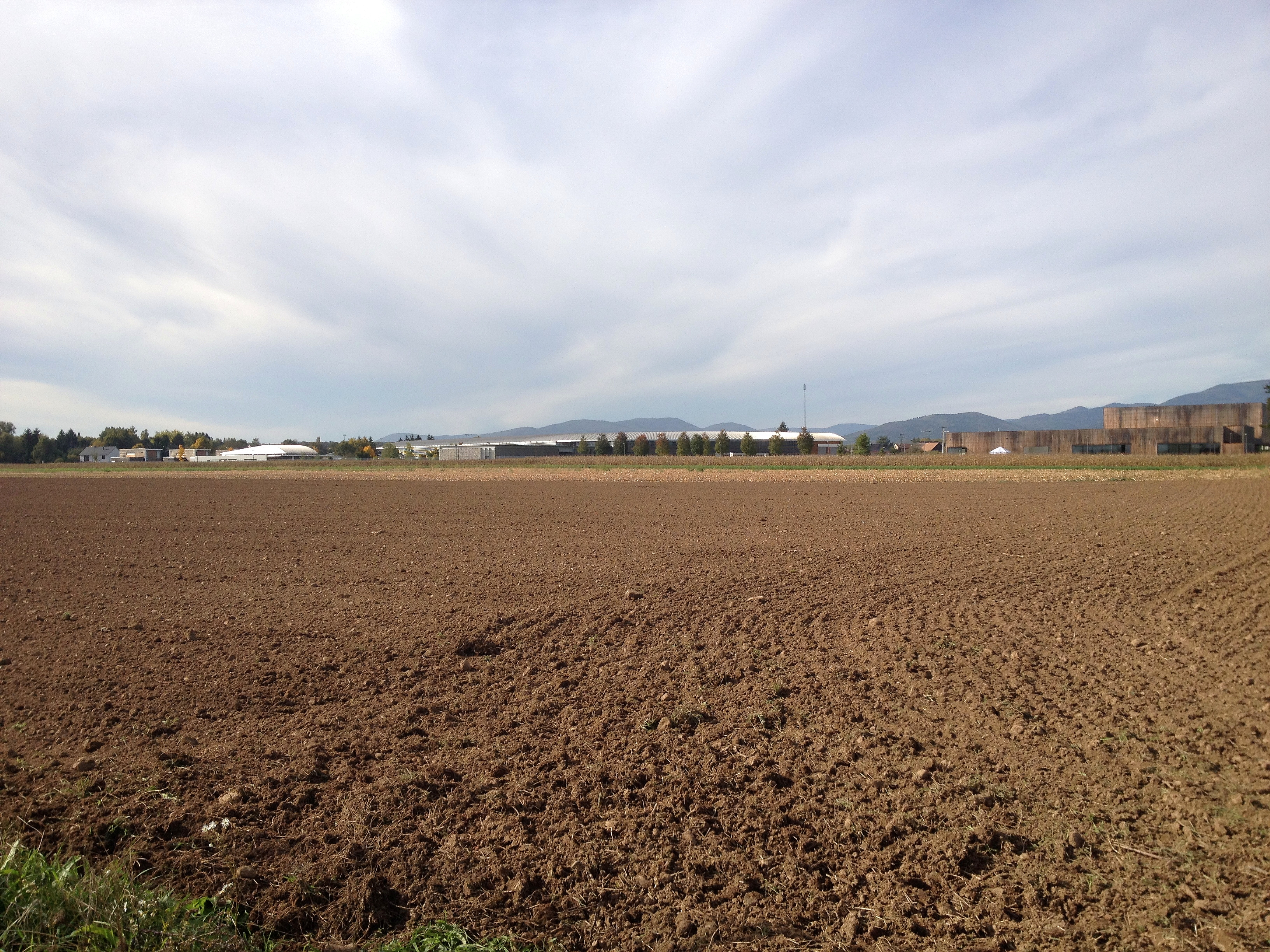 Collège Nathan Katz (Burnhaupt-le-Haut, France) vu depuis les champs à l'automne 2013.